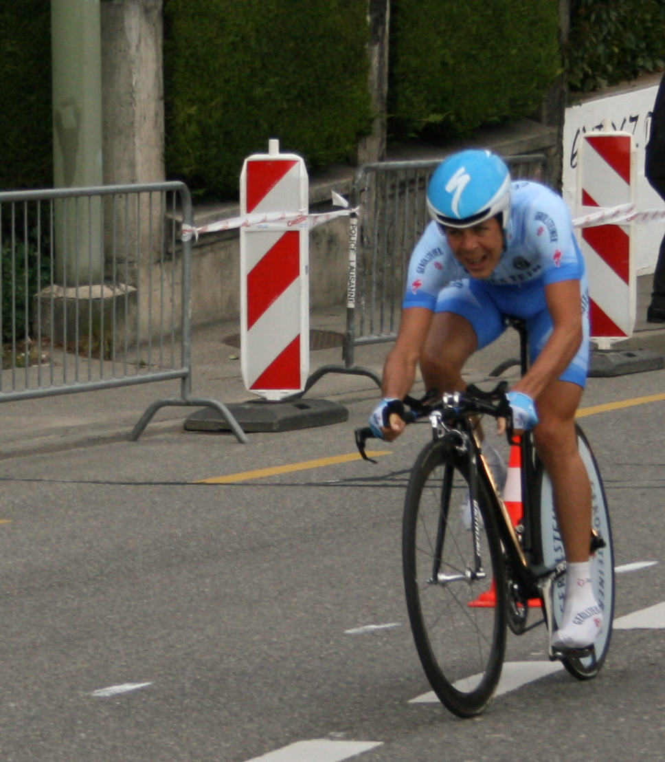 Bernhard Kohl prologue du Tour de Romandie 2007